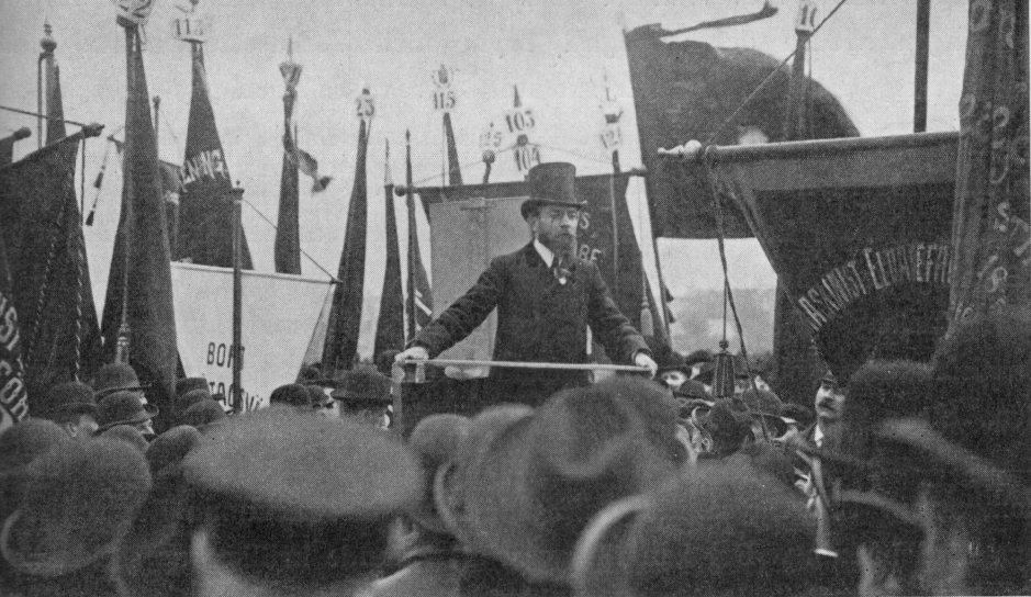 K.G. Ossiannilsson, ordförande i SSU (1903-04), talar vid en 1 maj-demonstration på Gärdet 1906